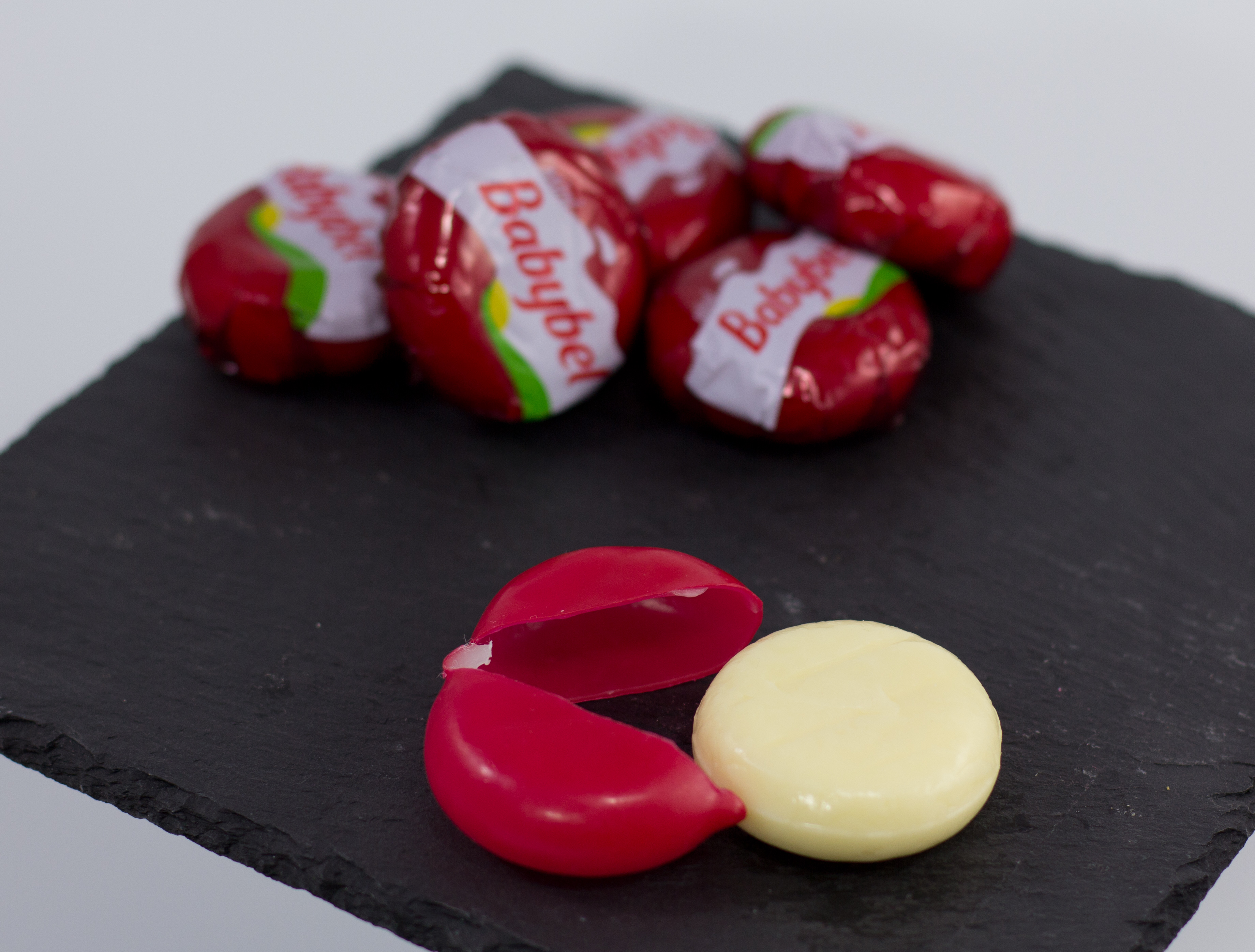 Babybel